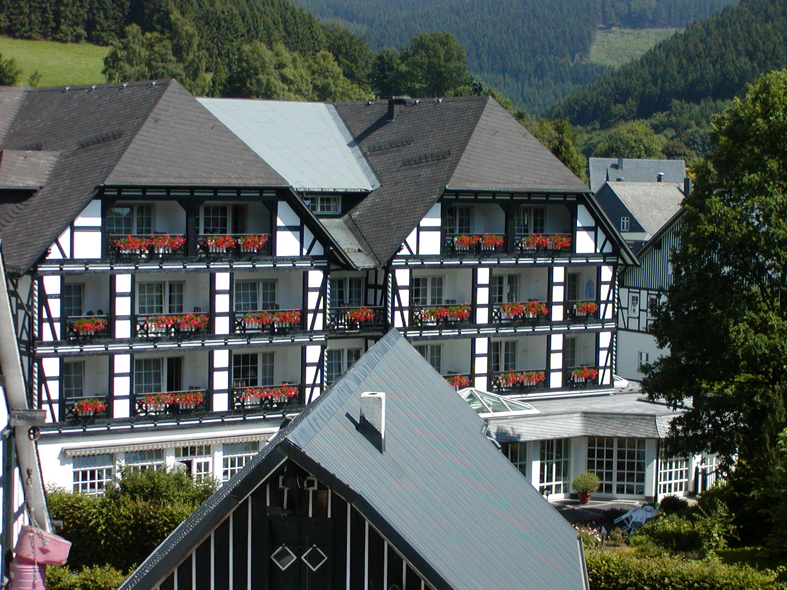 Gasthof Schütte in Oberkirchen